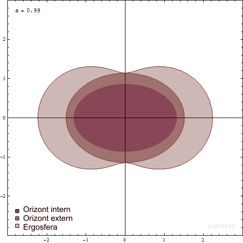 Diagrama limitei statice (ergosferă) și a orizonturilor evenimentelor interioare și exterioare ale unei găuri negre rotative. „a” este parametrul spin al găurii negre rotative; cu un parametru spin mic, ergosfera converge către un elipsoid, în timp ce cu un parametru spin mare seamănă cu o formă de dovleac. Axele sunt în unități de GM/c².